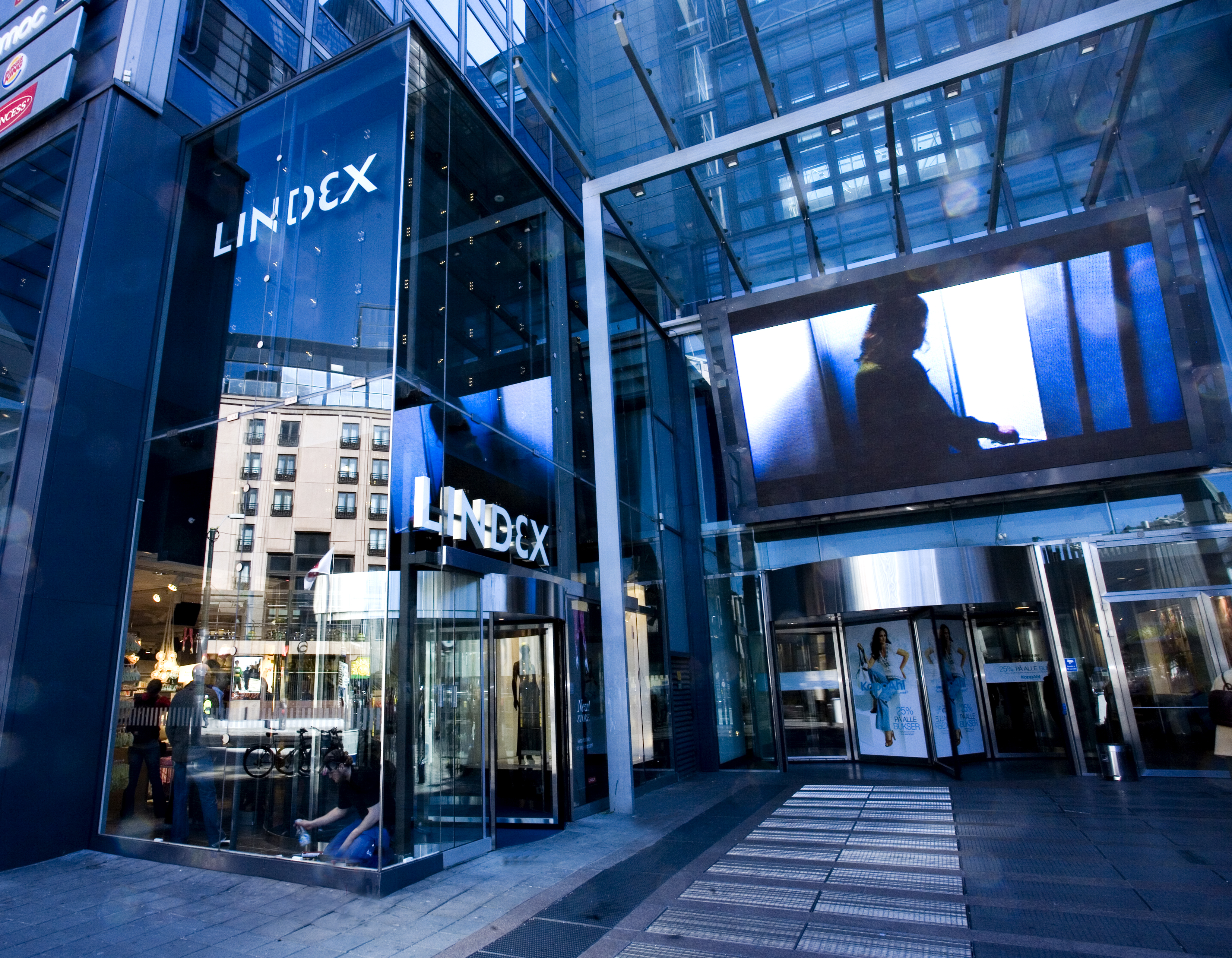 Lindex i Oslo City, Norge